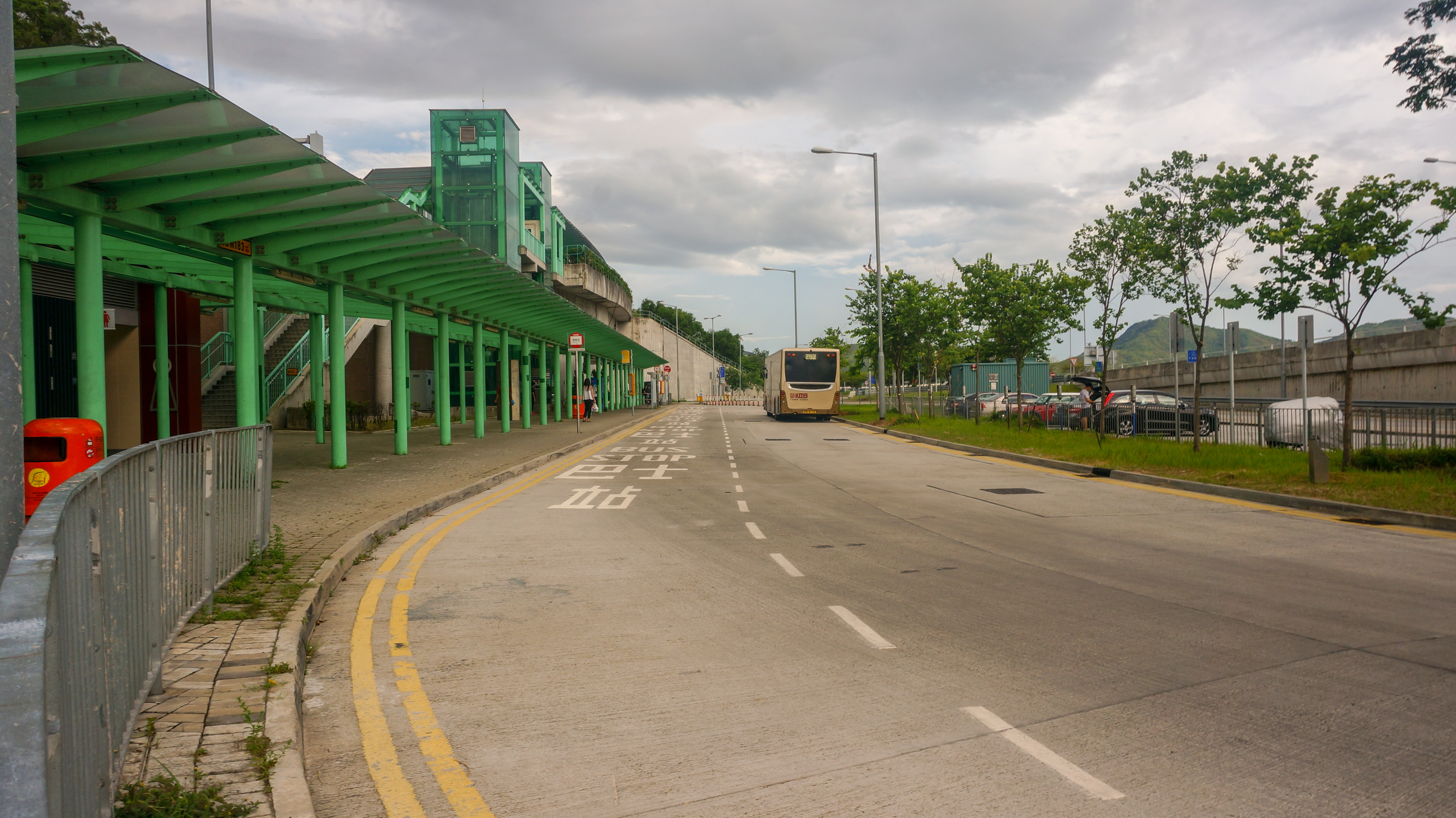 下層轉車站站位